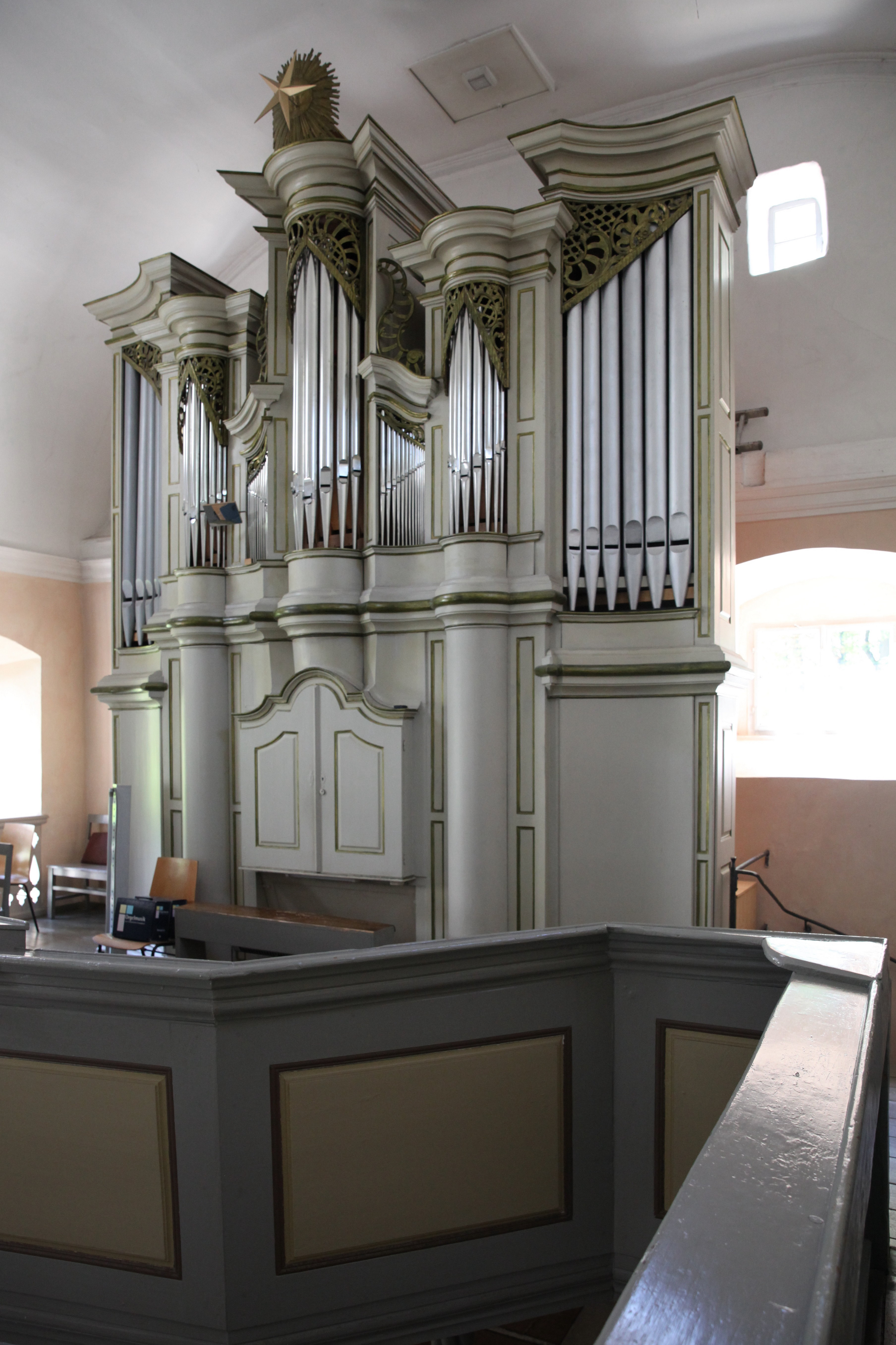 Schloßkirche in Niederfüllbach